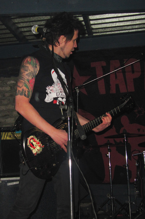 Концерт Тараканов! в Самаре